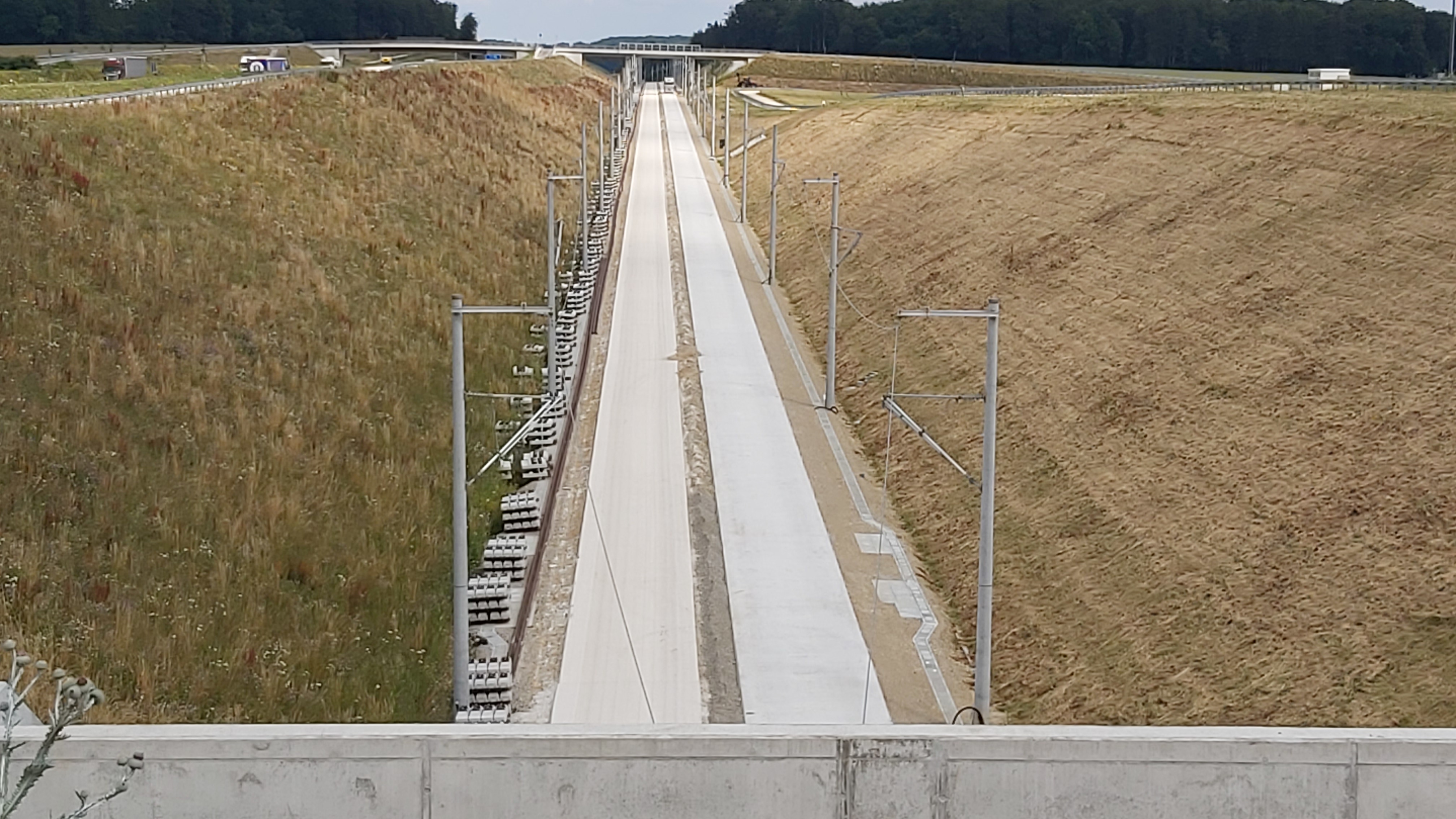 Blick vom Ostportal des Tunnels Merklingen auf die im Bau befindliche Neubaustrecke.